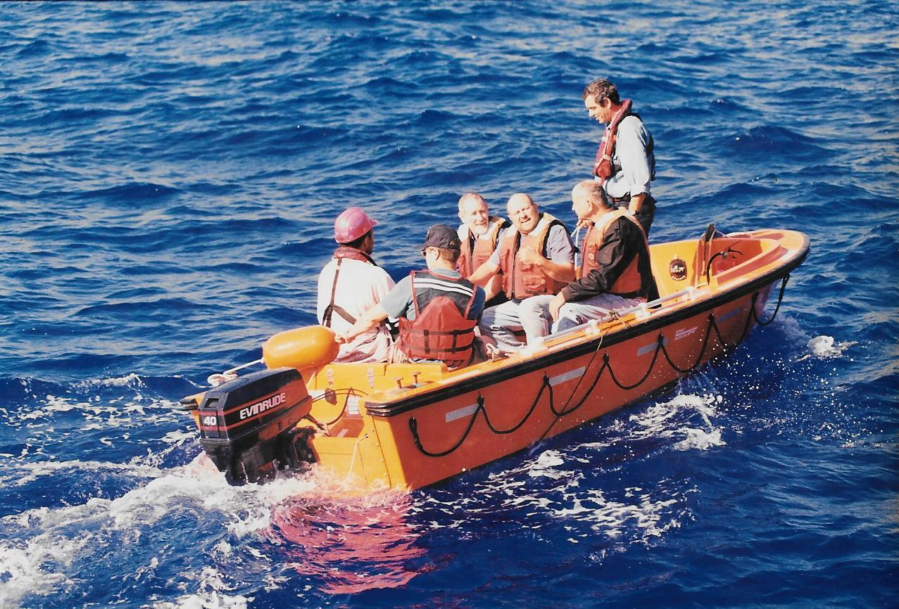 צוות חקירת ממצאי שברי הצוללת דקר